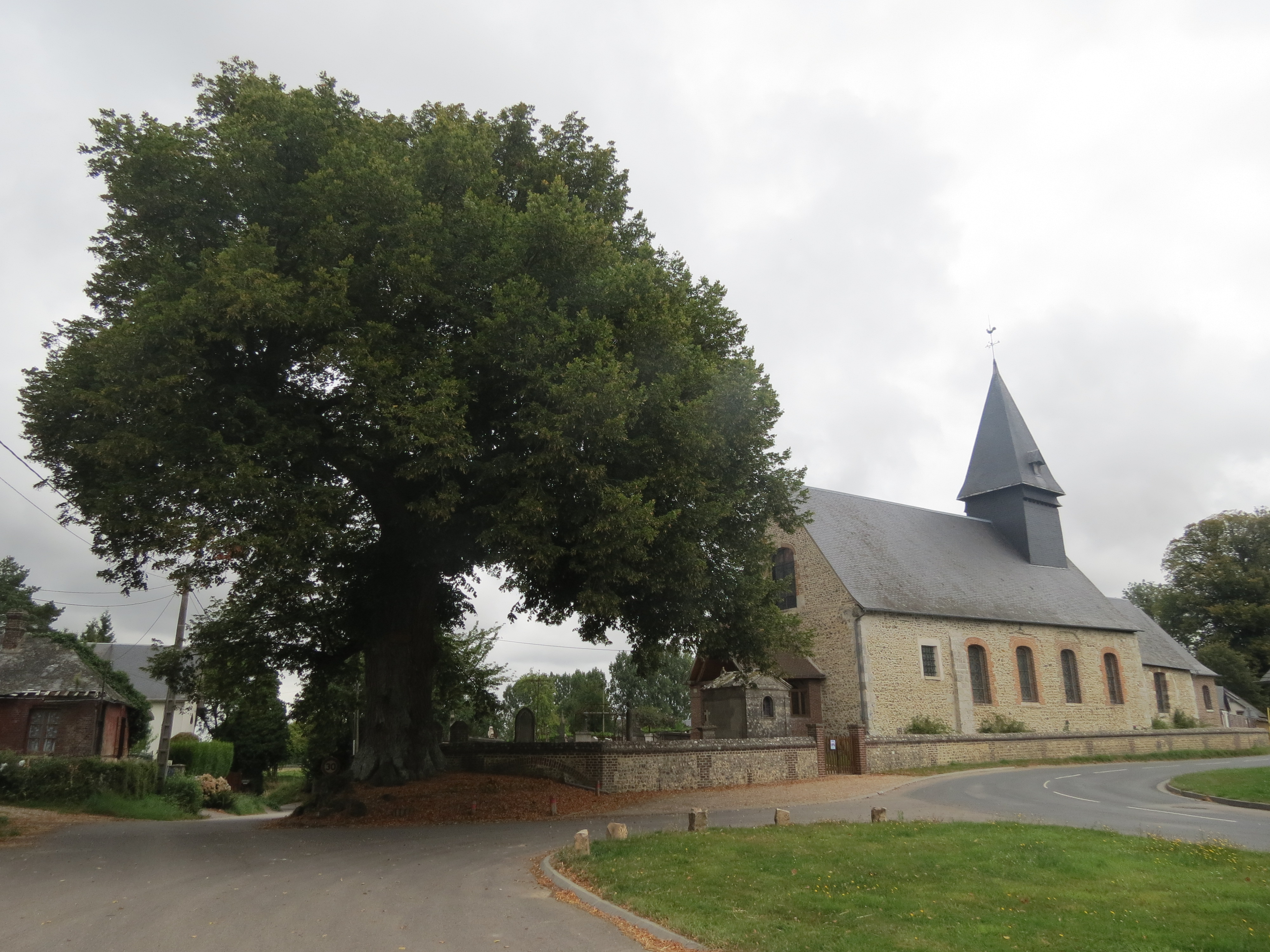 Église et tilleul de Mesnil-Raoul (Seine-Maritime, France).